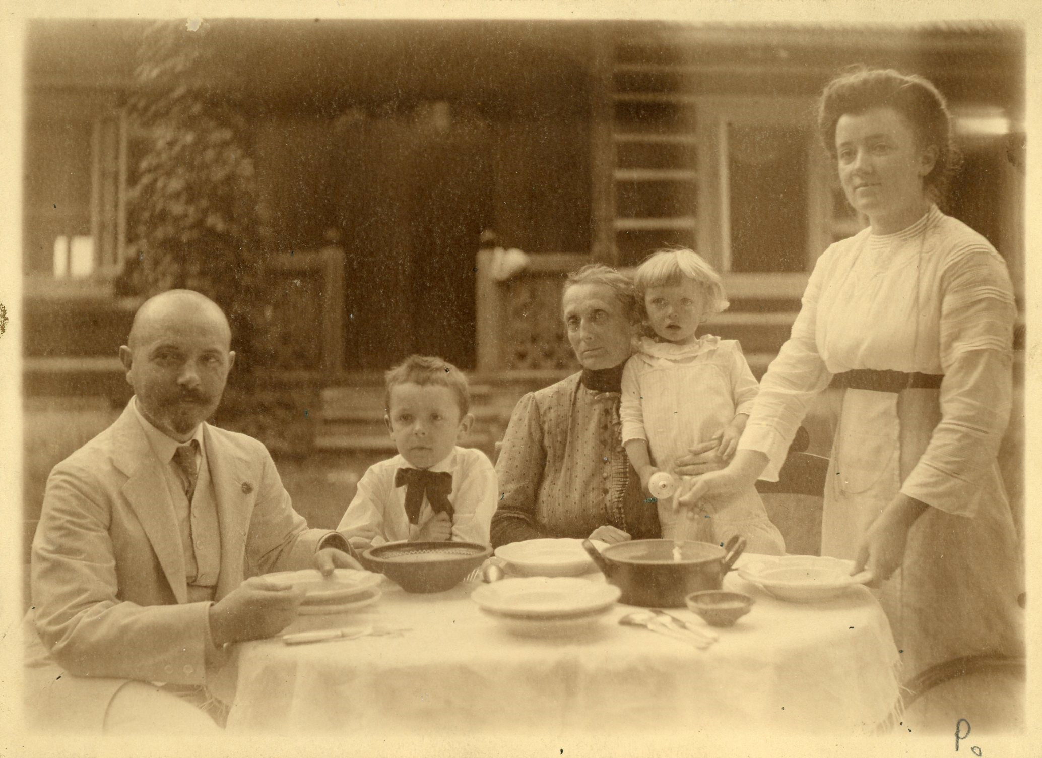 Kamilla i Antoni Chołoniewscy z synami w roku 1912